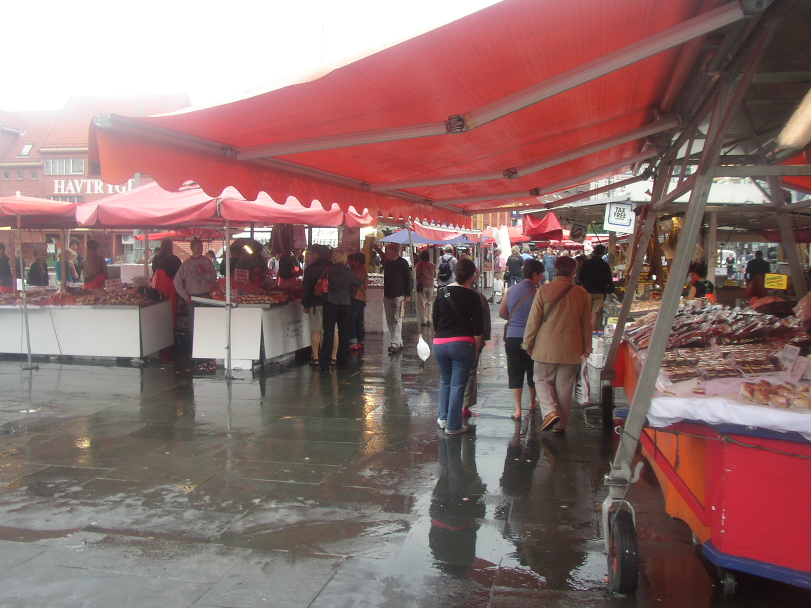 Célèbre marché aux poissons de Bergen, vieux de près de 10 siècles, le 29/07/06.